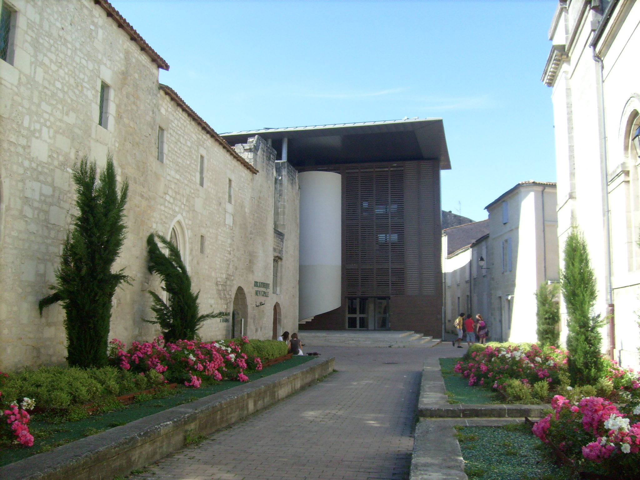 Bâtiment dit « de l'hostellerie » à Saintes